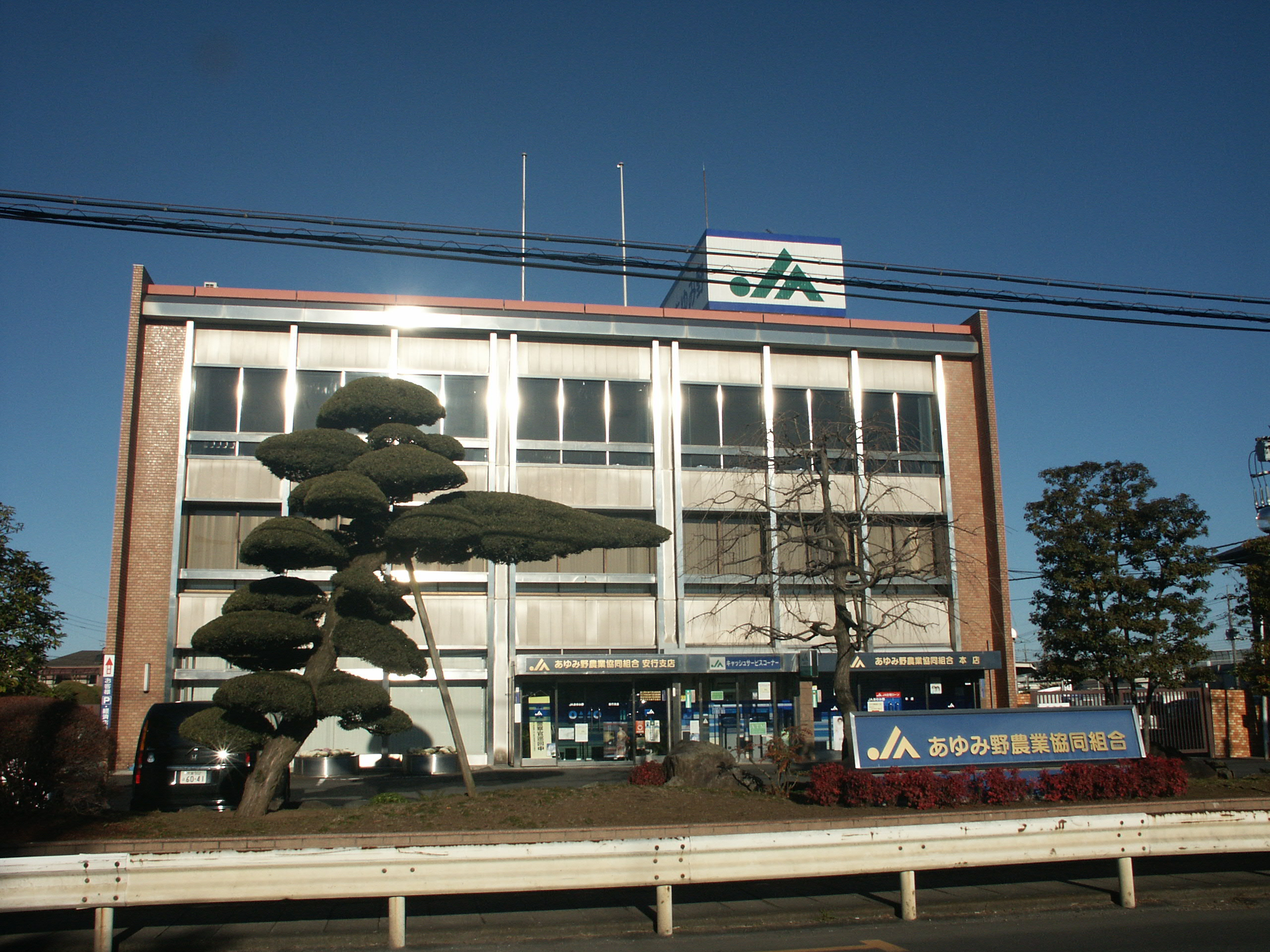 埼玉県川口市に所在するあゆみ野農業協同組合本店